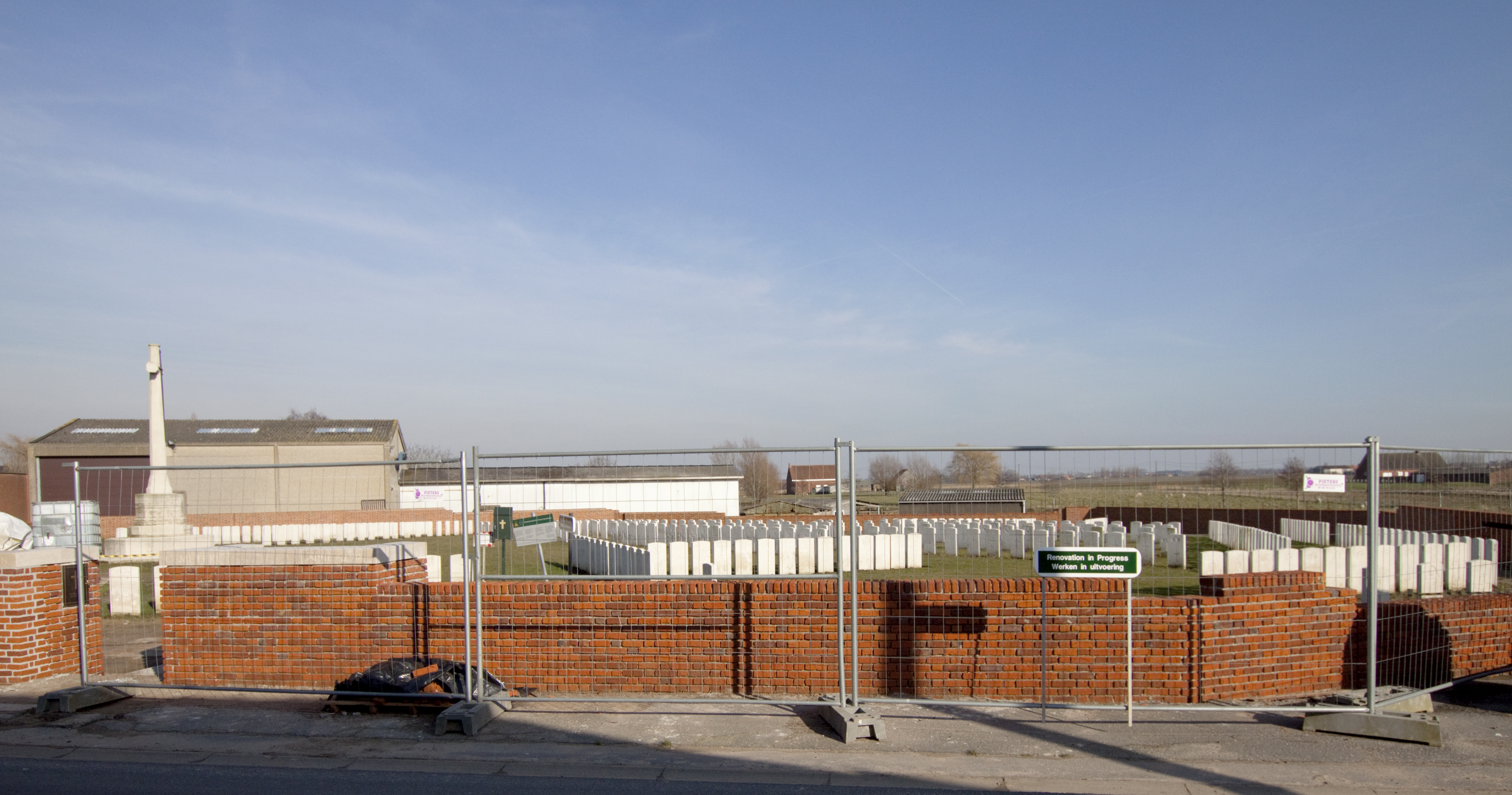 St. Julien Dressing Station Cemetery